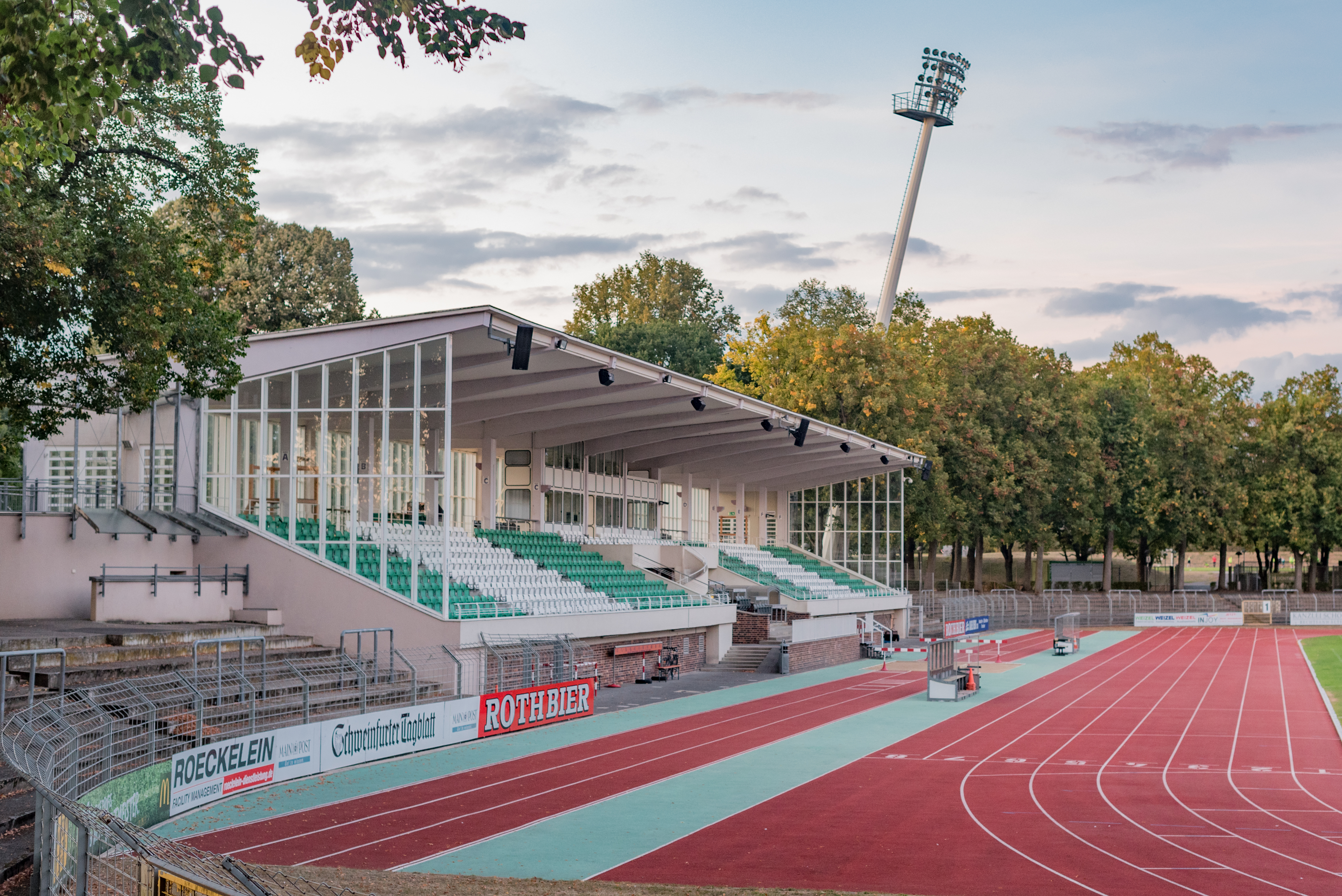 Schweinfurt, Ander-Kupfer-Platz 2, Tribüne